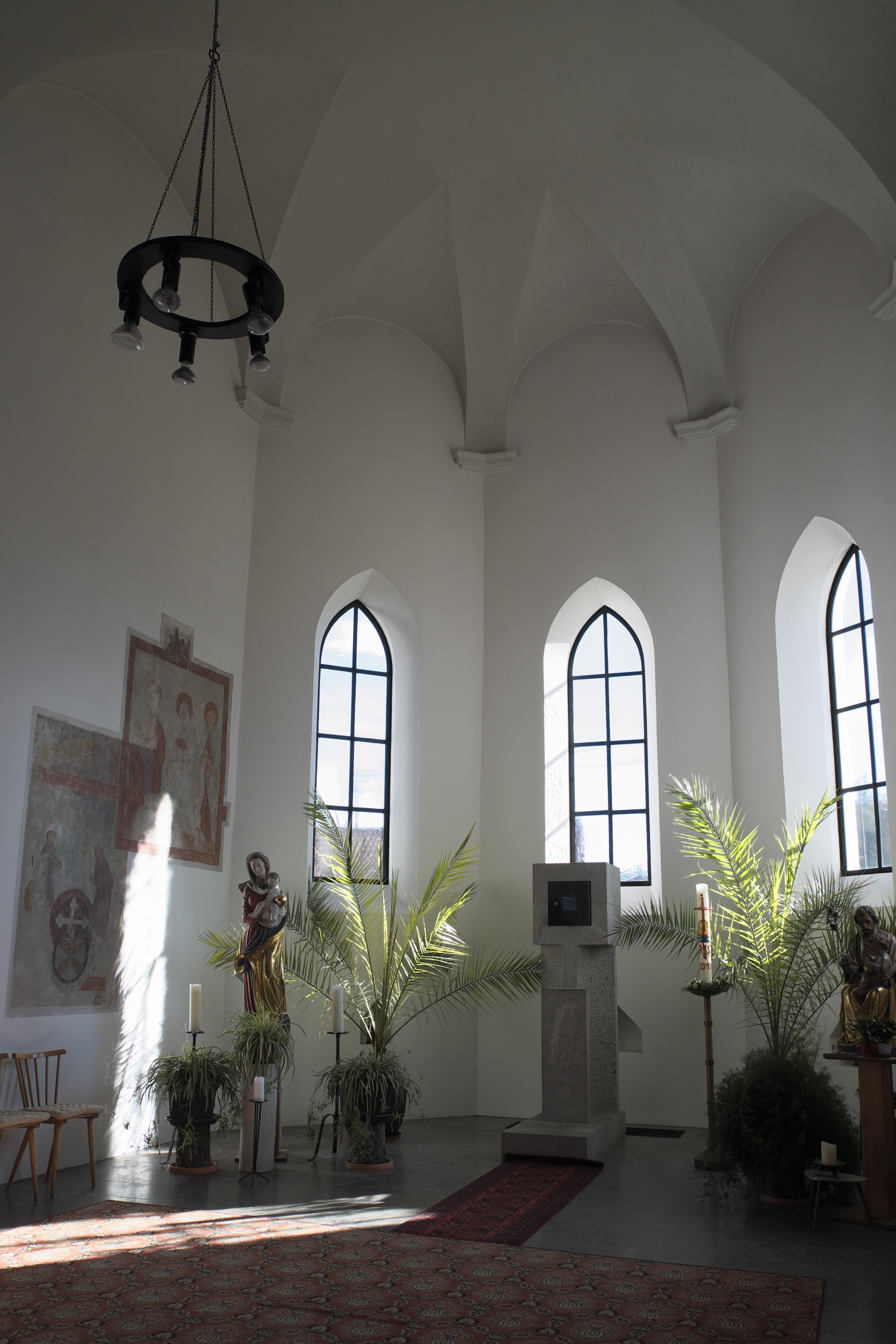 Katholische Pfarrkirche St. Peter in Wielenbach im Landkreis Weilheim-Schongau (Bayern/Deutschland), Chor